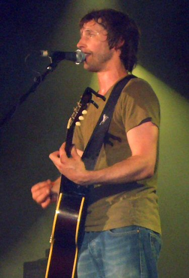 James Blunt Bécsben / James Blunt in Wien Gasometer